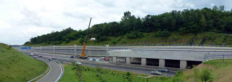 Einfahrt in den Mainzer Tunnel an der Anschlussstelle Hechtsheim-Ost, zu erkennen ist auch die Abfahrt von der Autobahn. Die Aufnahme entstand am "Tunneltag". Ein Kran hievte einen Transporter auf die ursprüngliche Höhe der alten Autobahn um den Niveauunterschied deutlich zu machne.